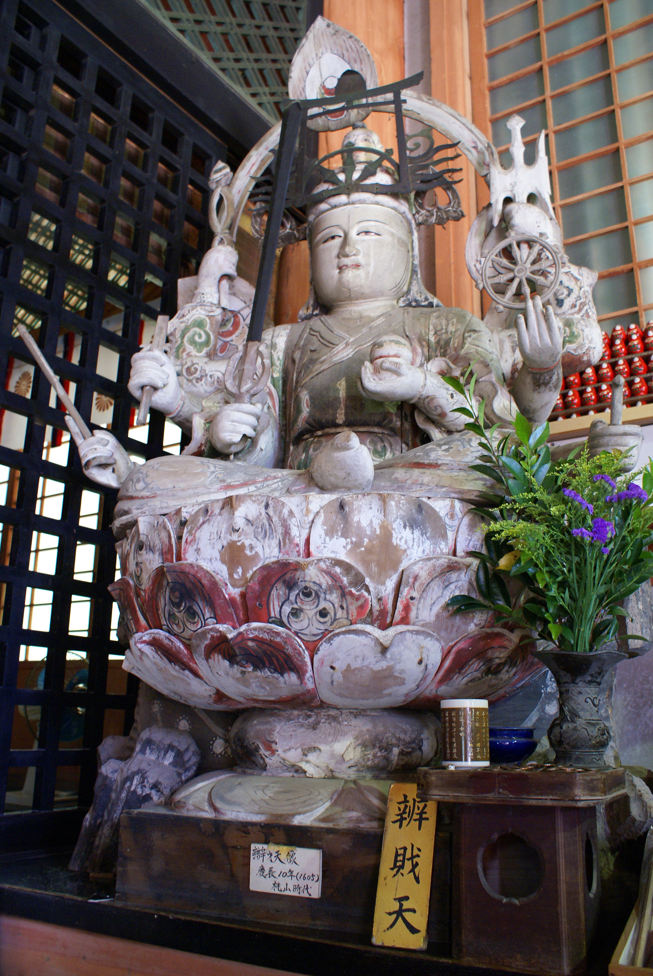 Hogonji in Nagahama, Shiga, Japan